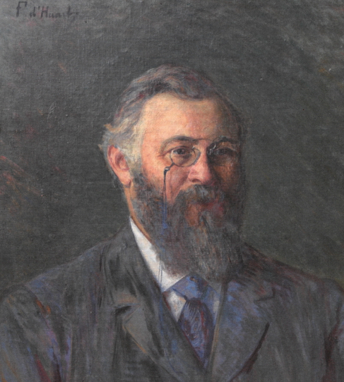 Den Dr Welter, portraitéiert vum Ferdinand d'Huart.